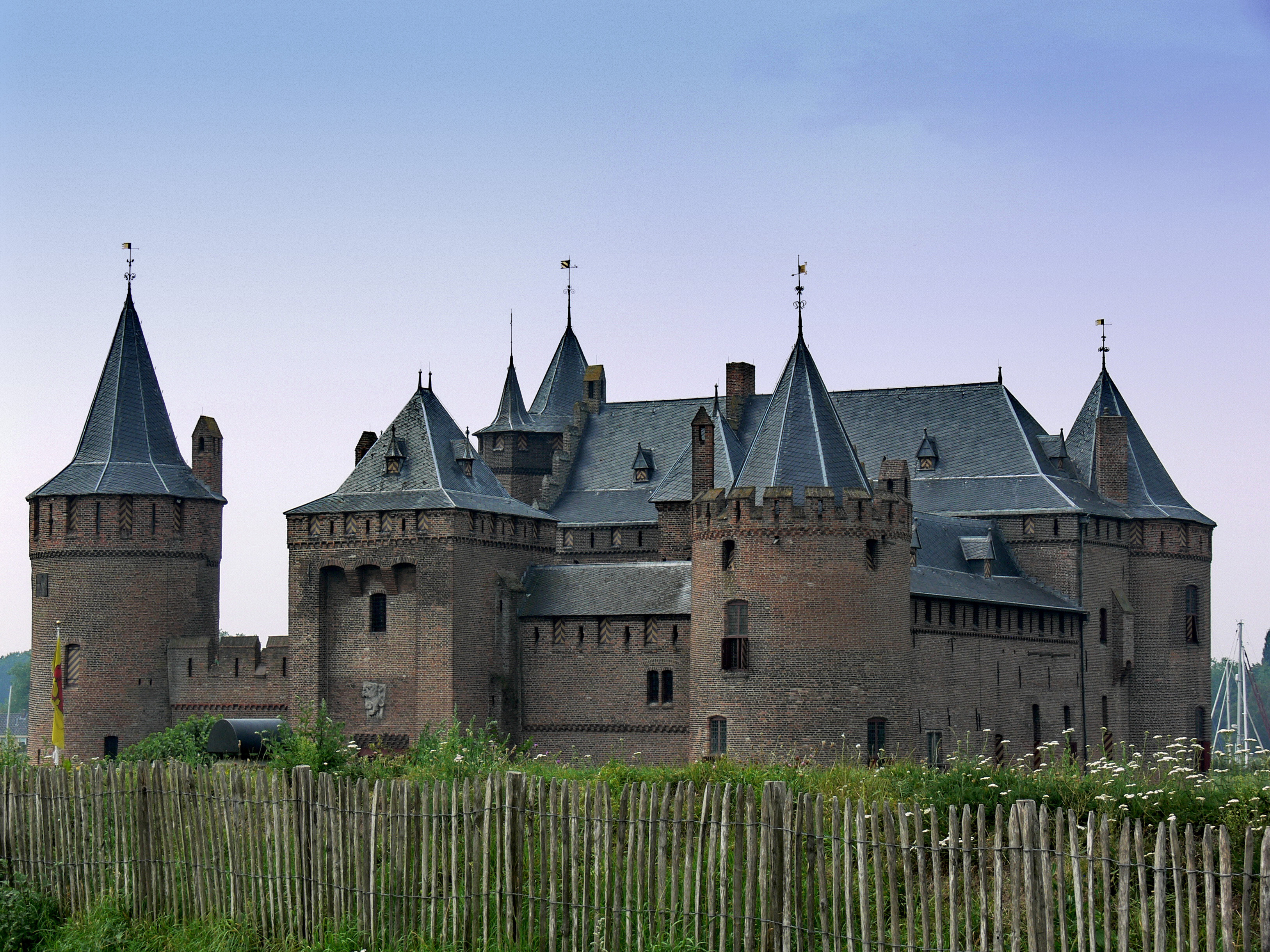 Muiden Muiderslot